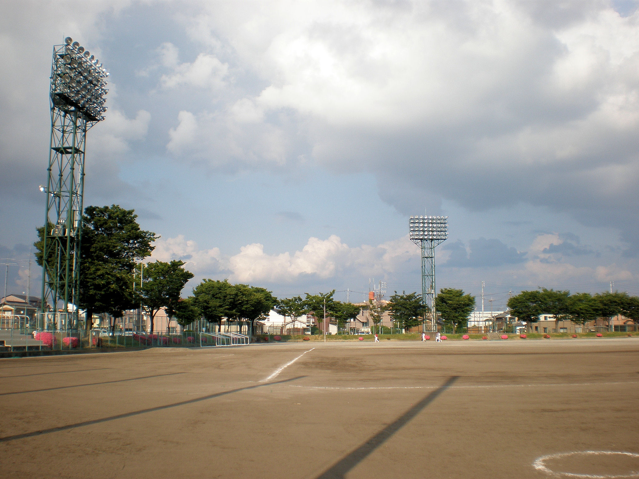 愛知県小牧市にある小牧市南スポーツセンター